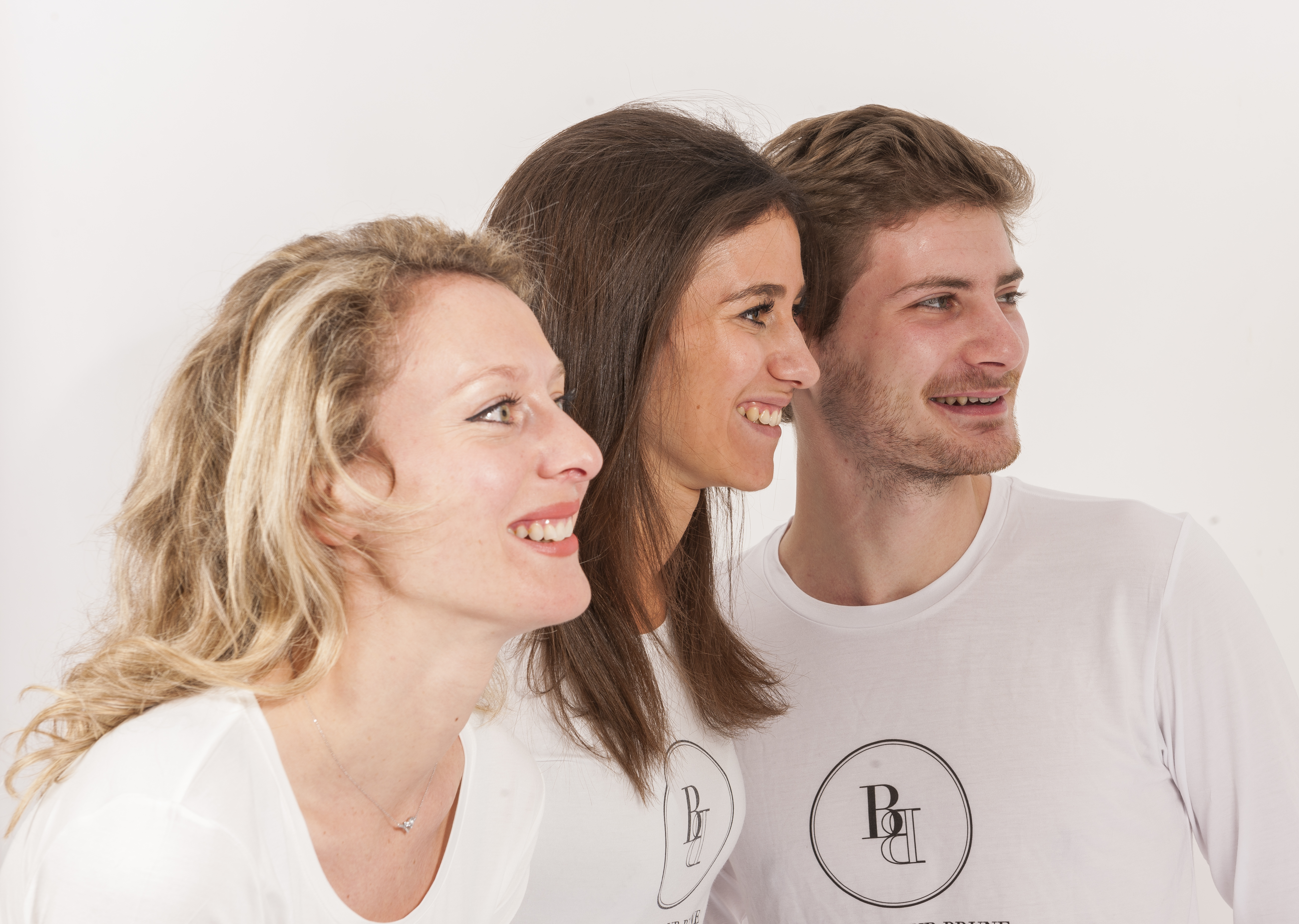 Marine à gauche, Clémentine au milieu et Thomas à droite